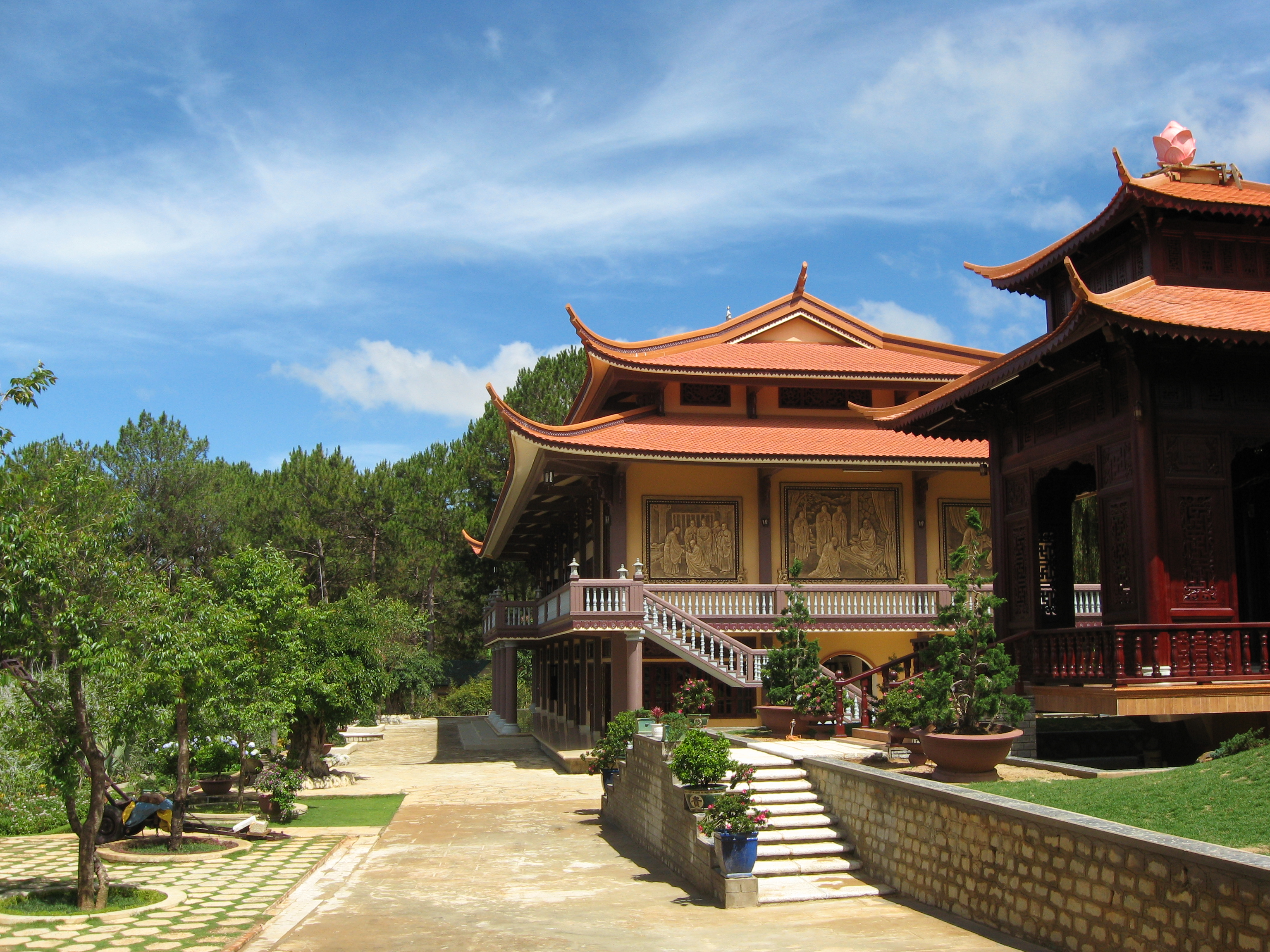 Truc Lam Zen Monastery